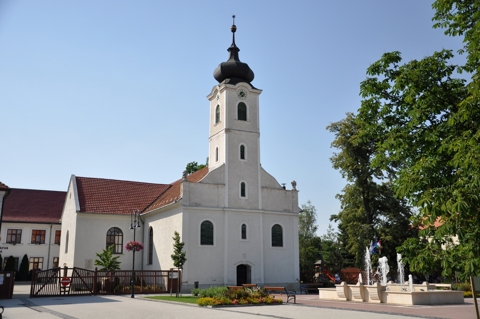 Reformed Church and lyceum in Gödöllő, Hungary